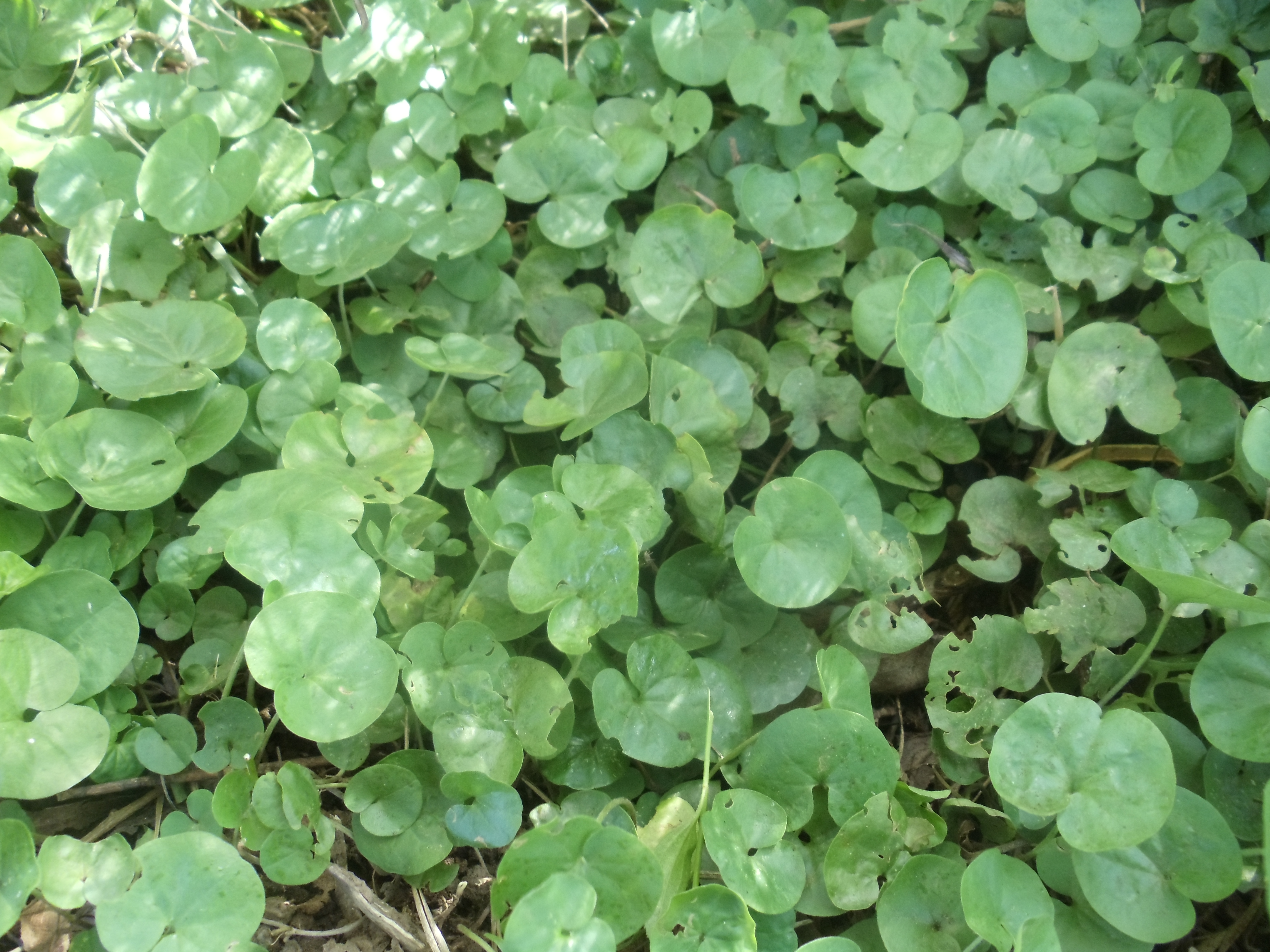 Dichondra microcalyx